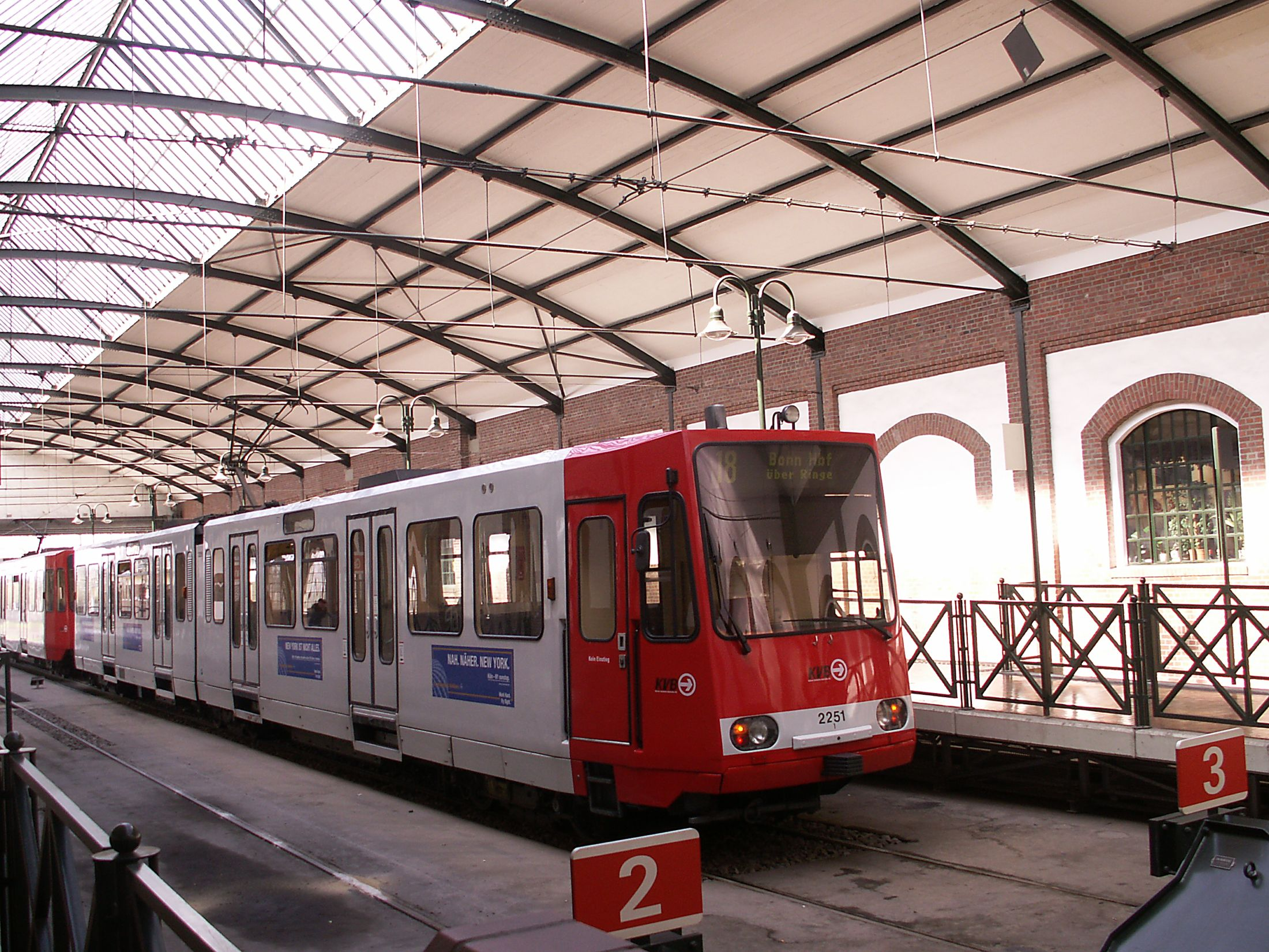 kvb